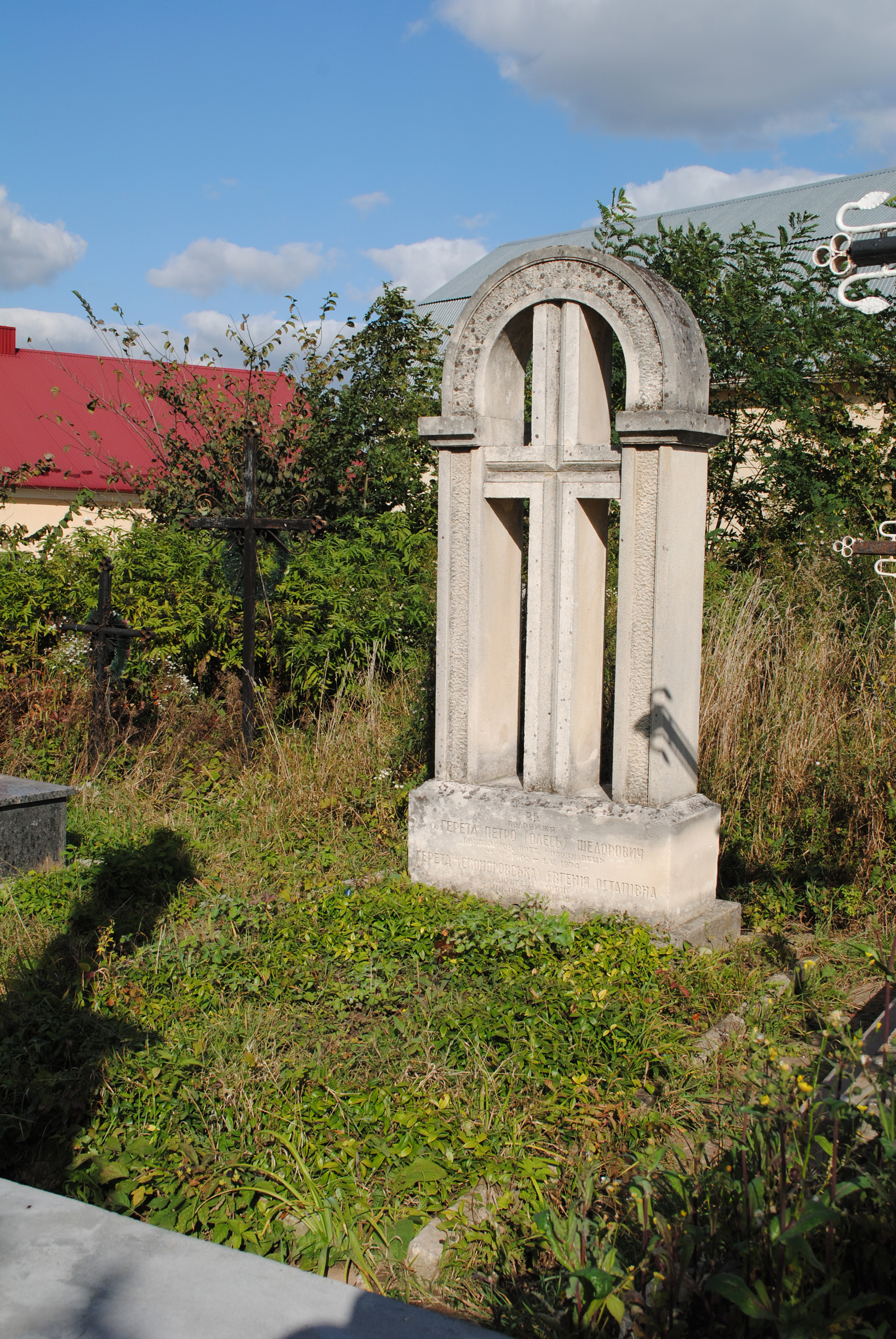 Могила громадсько-політичного діяча о. Петра Ґерети на кладовищі смт Велика Березовиця Тернопільського району Тернопільської області.